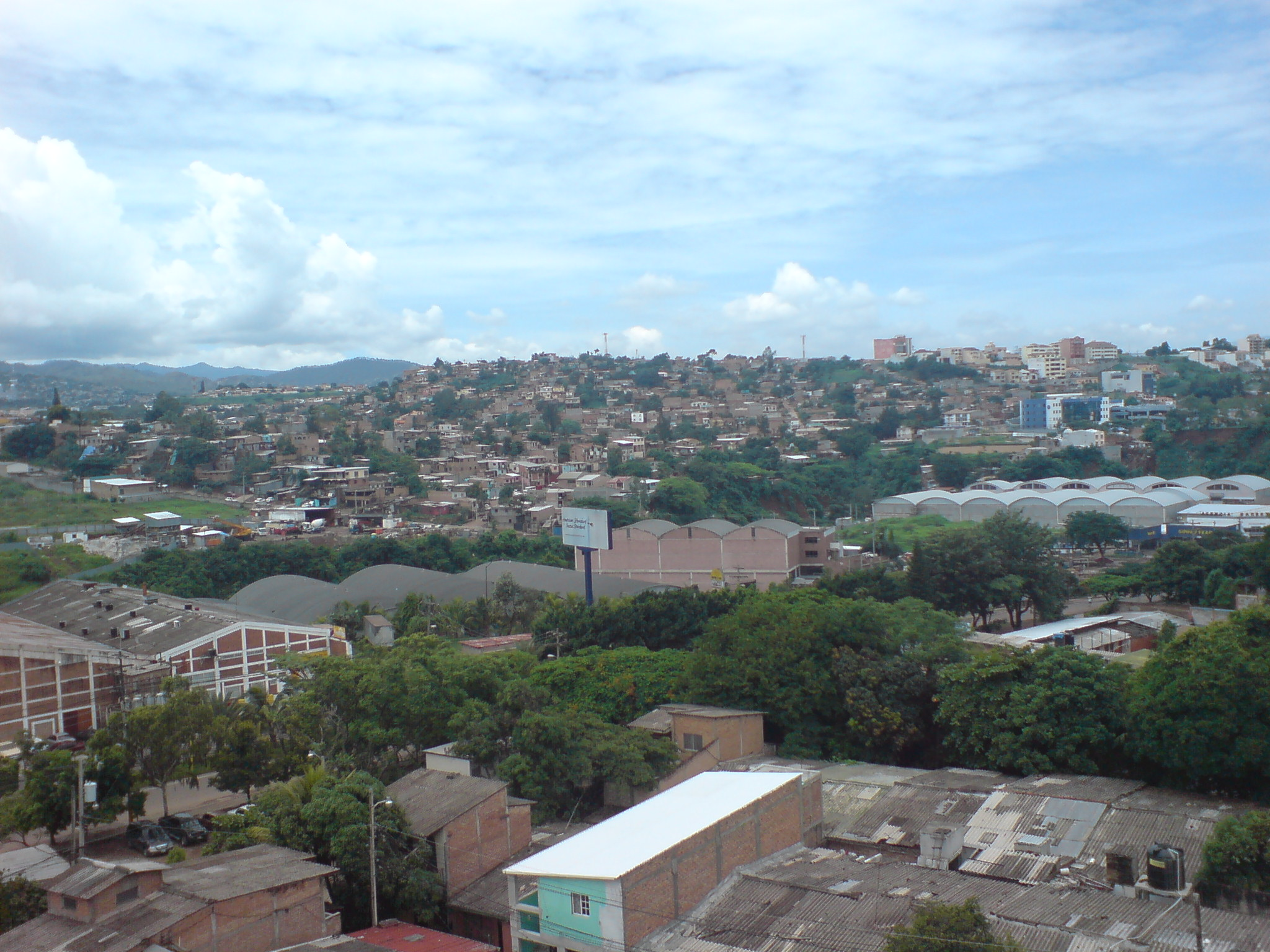 Vista de Tegucigalpa desde la colonia 21 de Octubre